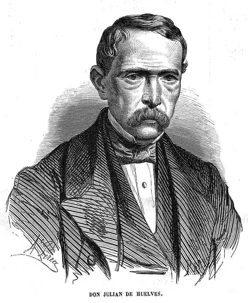 Julián de Huelves, en el El Museo Universal.